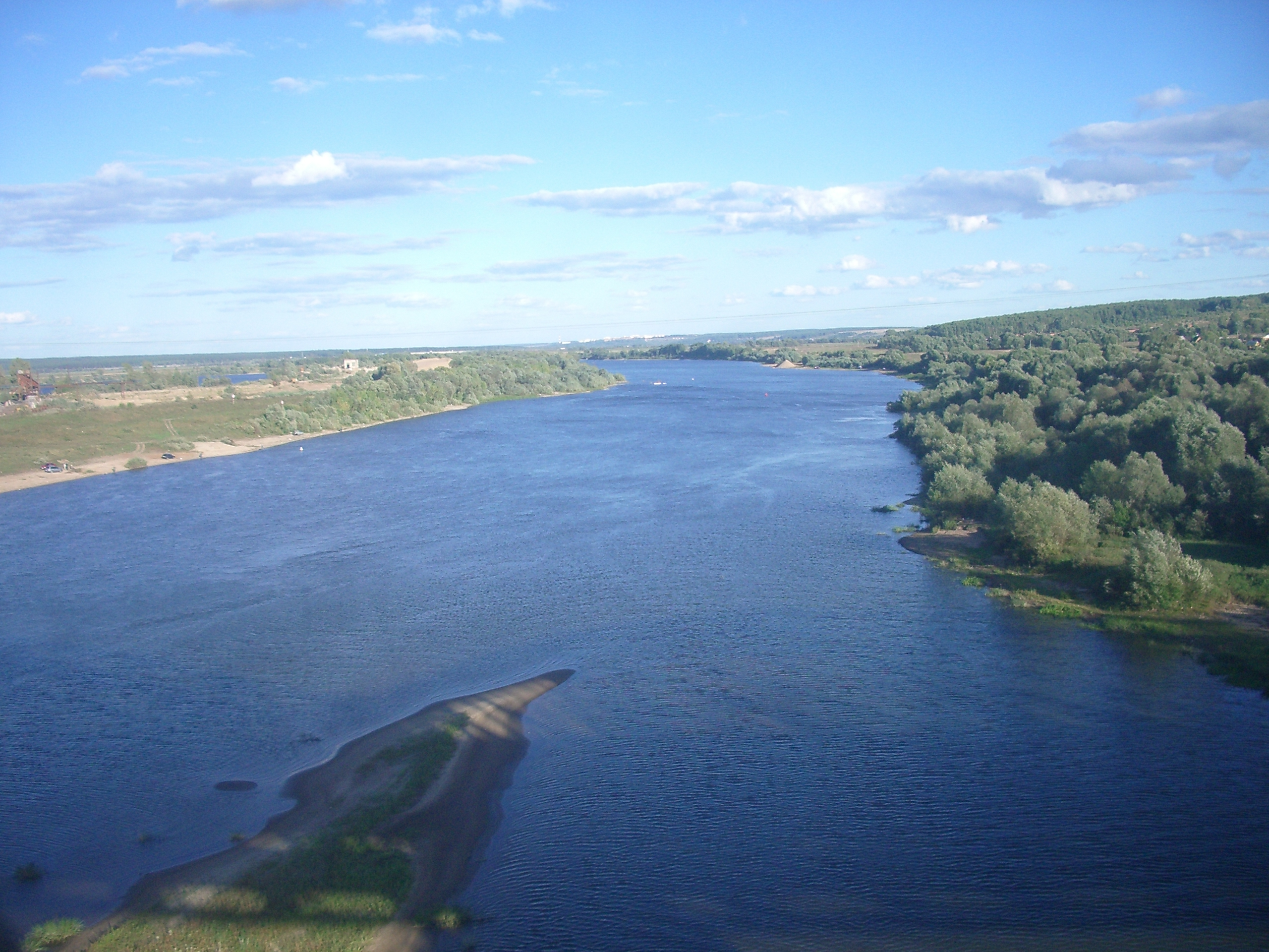 Серпухов. Через Оку-реку